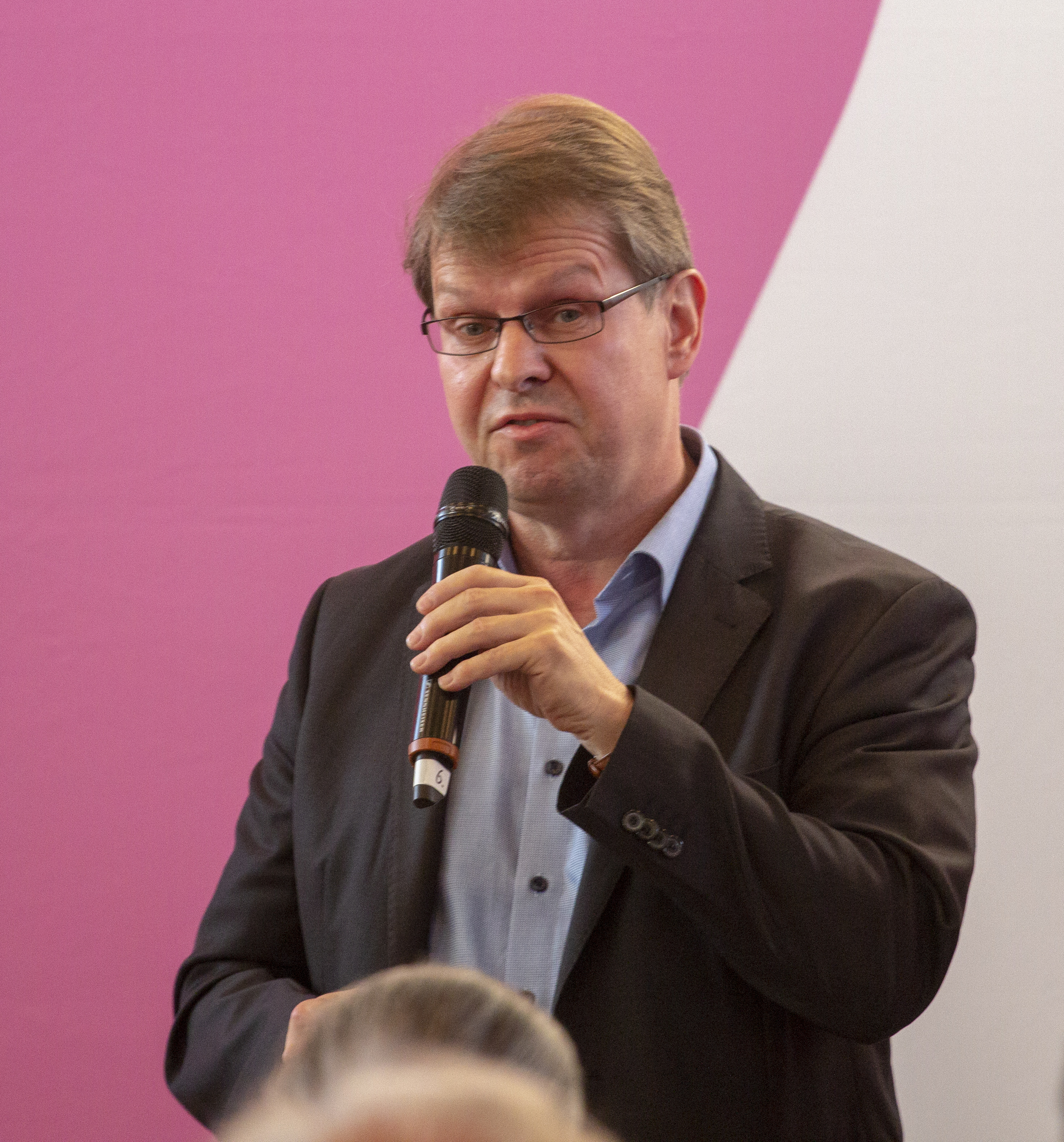 Ralf Stegner bei der SPD Regionalkonferenz zur Wahl des SPD-Vorsitzes am 10. September 2019 in Nieder-Olm.